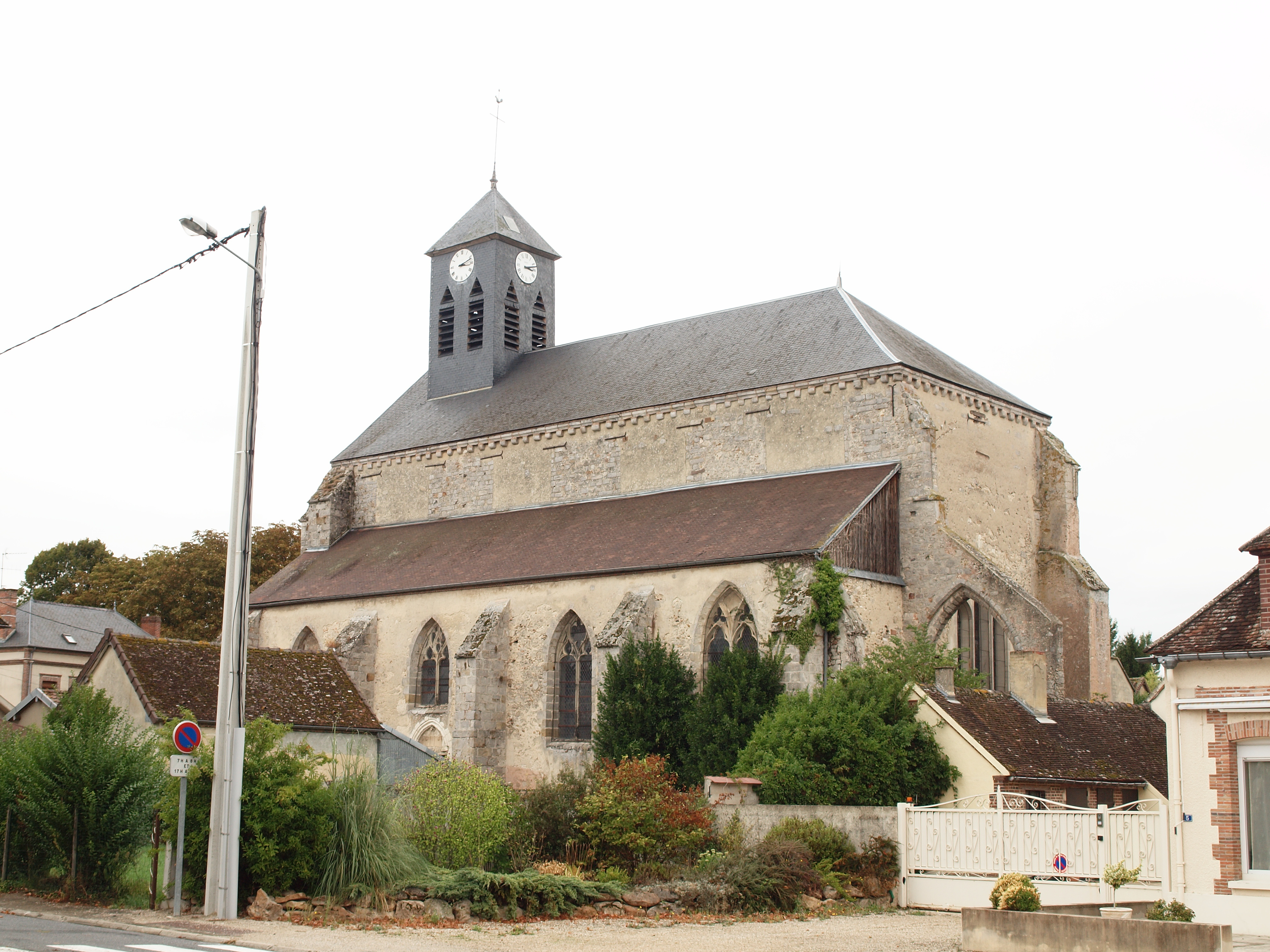 Gaye (Marne, France)